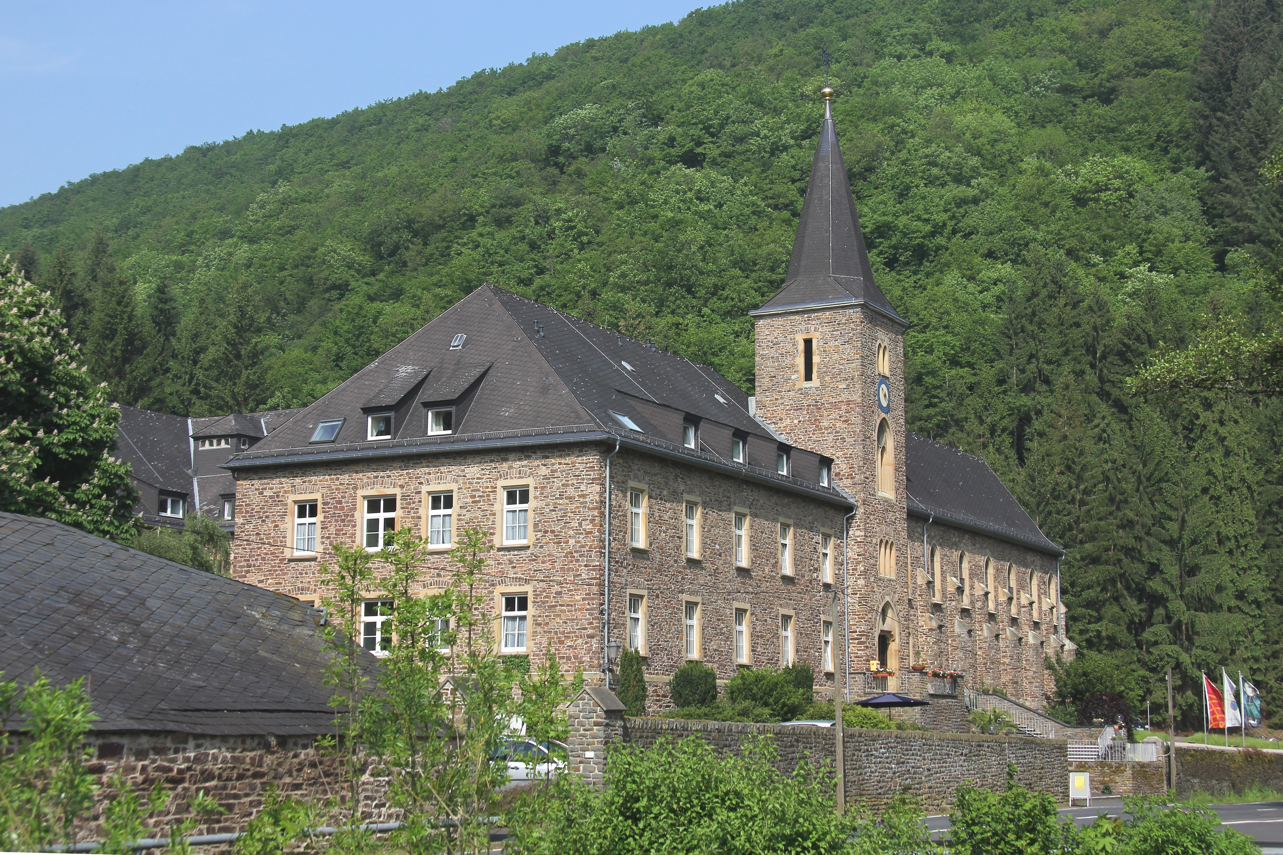 Kloster Maria Engelport im Flaumbachtal bei Treis-Karden